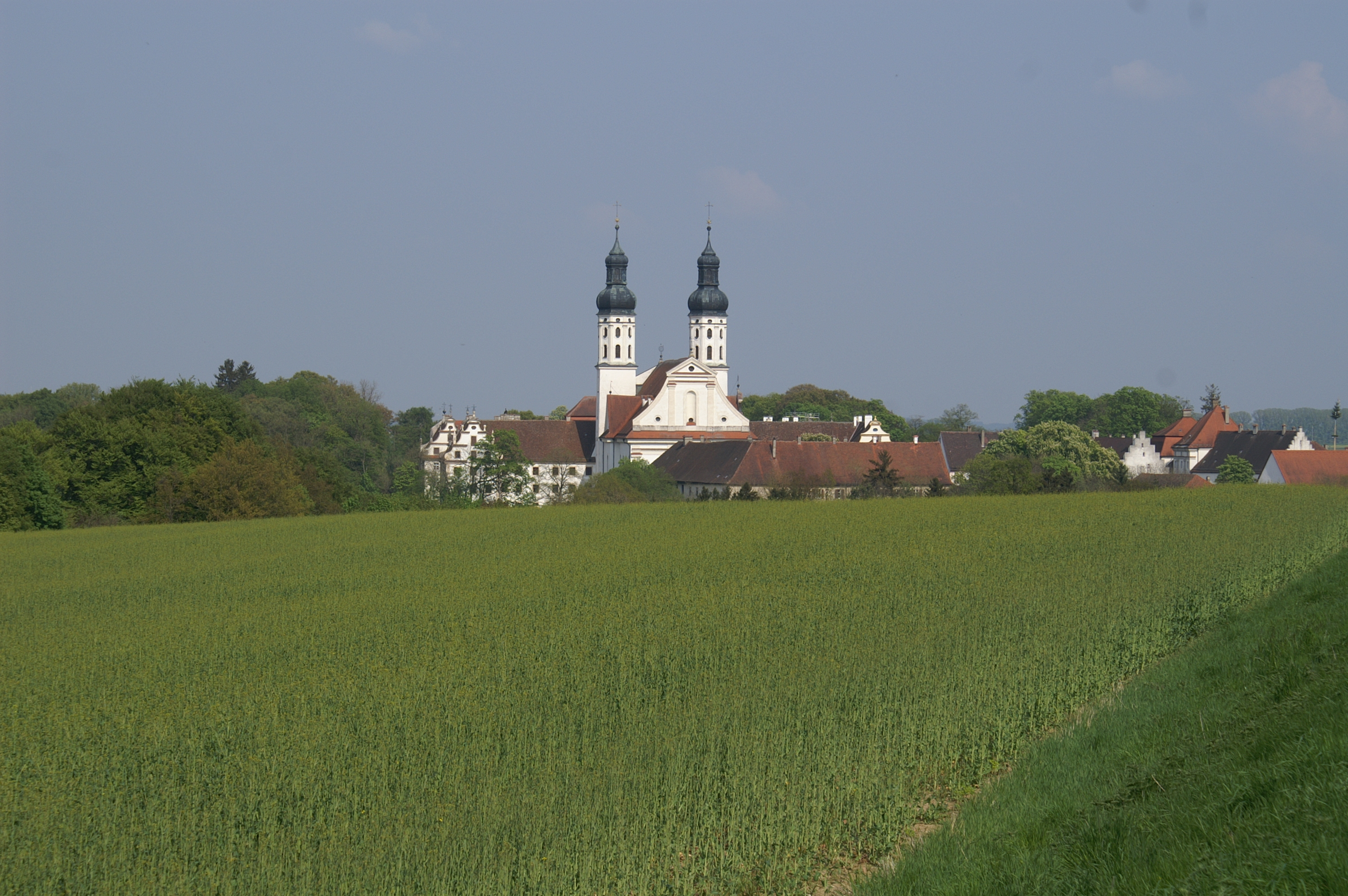 Obermarchtal im Alb-Donau-Kreis; Baden-Württemberg